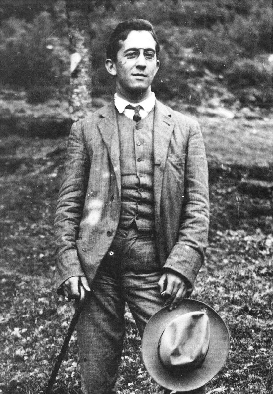 Antonio Losada Diéguez (1884–1929) Alternative namesLosada Diéguez; Antón Losada e Diéguez; Antón Losada e Diégues; Antón Lousada Diéguez; Antonio Losada Diéguez; Antonio Losada y DiéguezDescriptionSpanish writerDate of birth/death22 December 188415 October 1929Location of birth/deathBoborásPontevedra (municipality)Authority control : Q3393880 VIAF: 1149084 ISNI: 0000 0000 6635 7505 LCCN: n85256286 GND: 131588680 SUDOC: 070843821 WorldCat